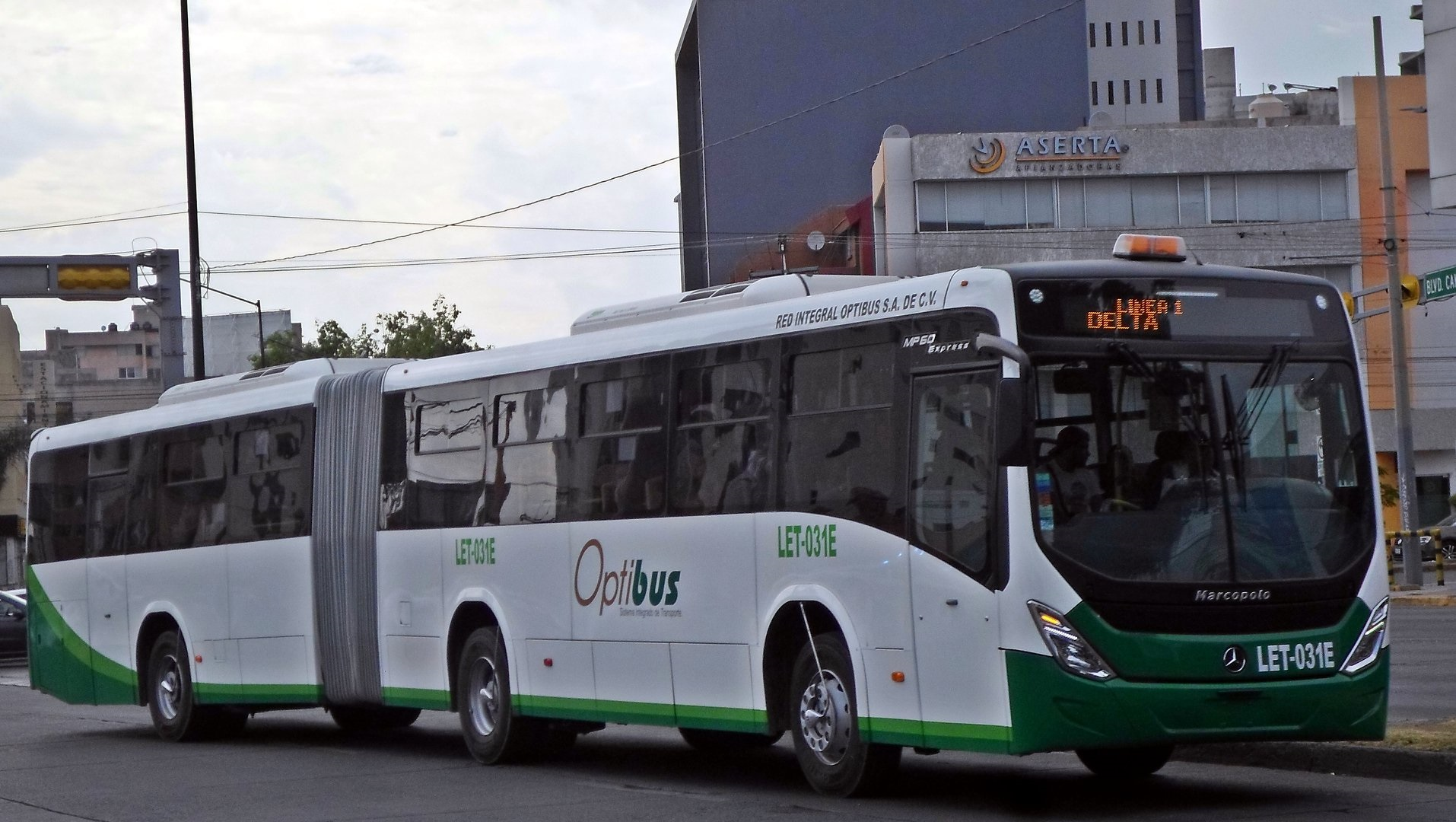 fotografía de la nueva unidad articulada LET-031E perteneciente a Consorcio OPTRA, cabe decir que toda "oruga" que adquiere OPTRA de este modelo viene integrada con aire acondicionado.